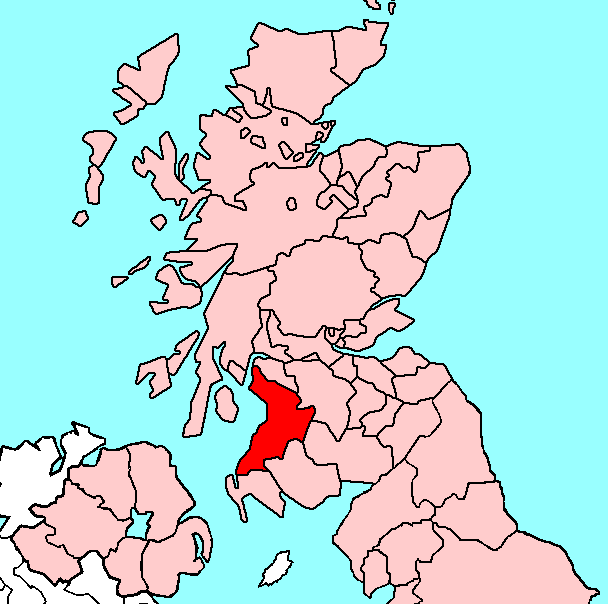 Ayrshire